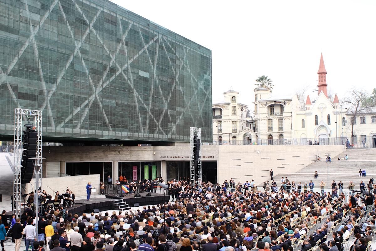 Conmemoración 40 años en Museo de la Memoria 09/09/2013.